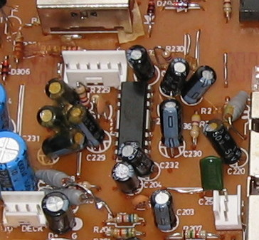 Lautsprecherverstärker im einem Radiorekorder